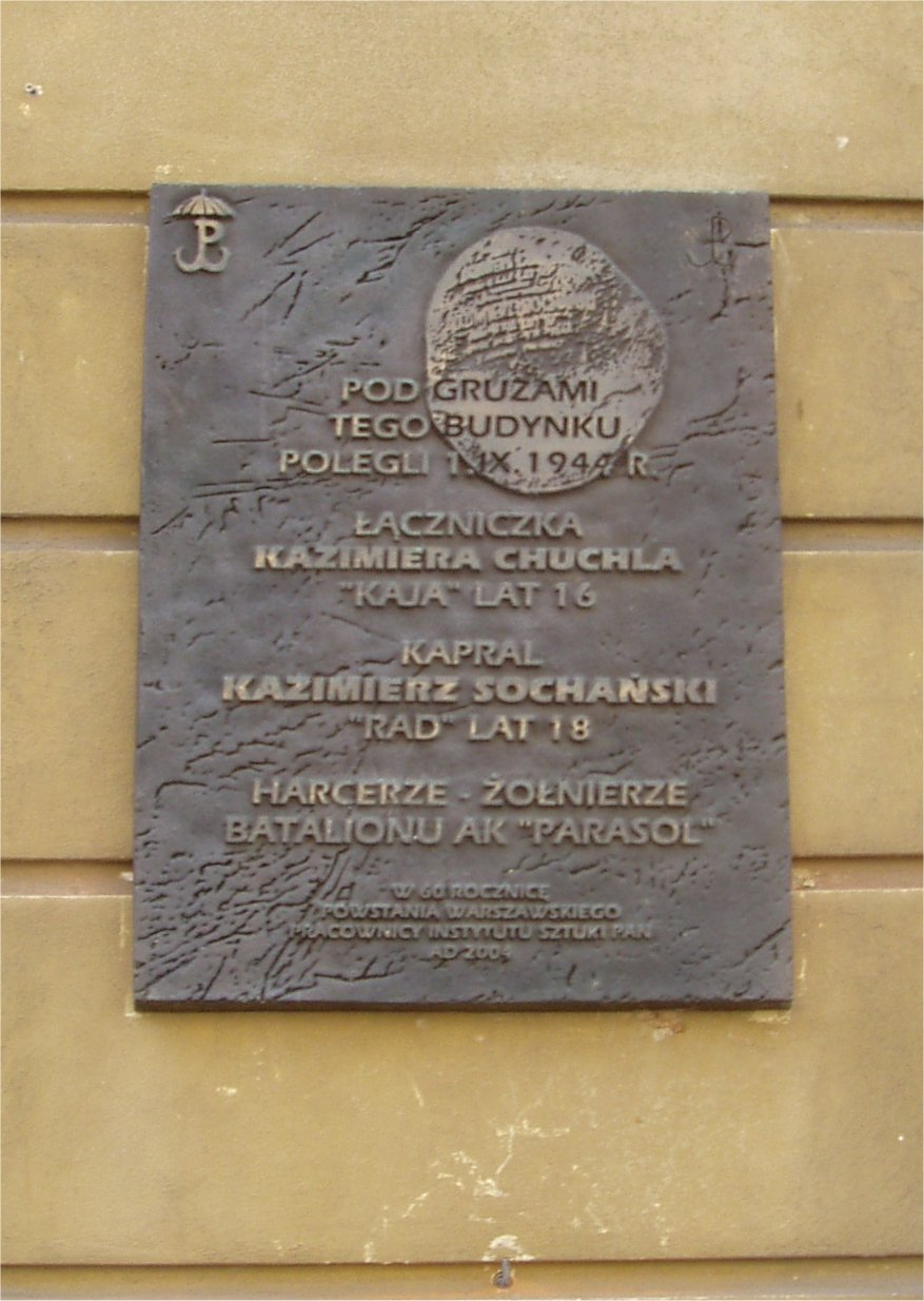 Przy ul. Długiej w Warszawie (fot Zu)